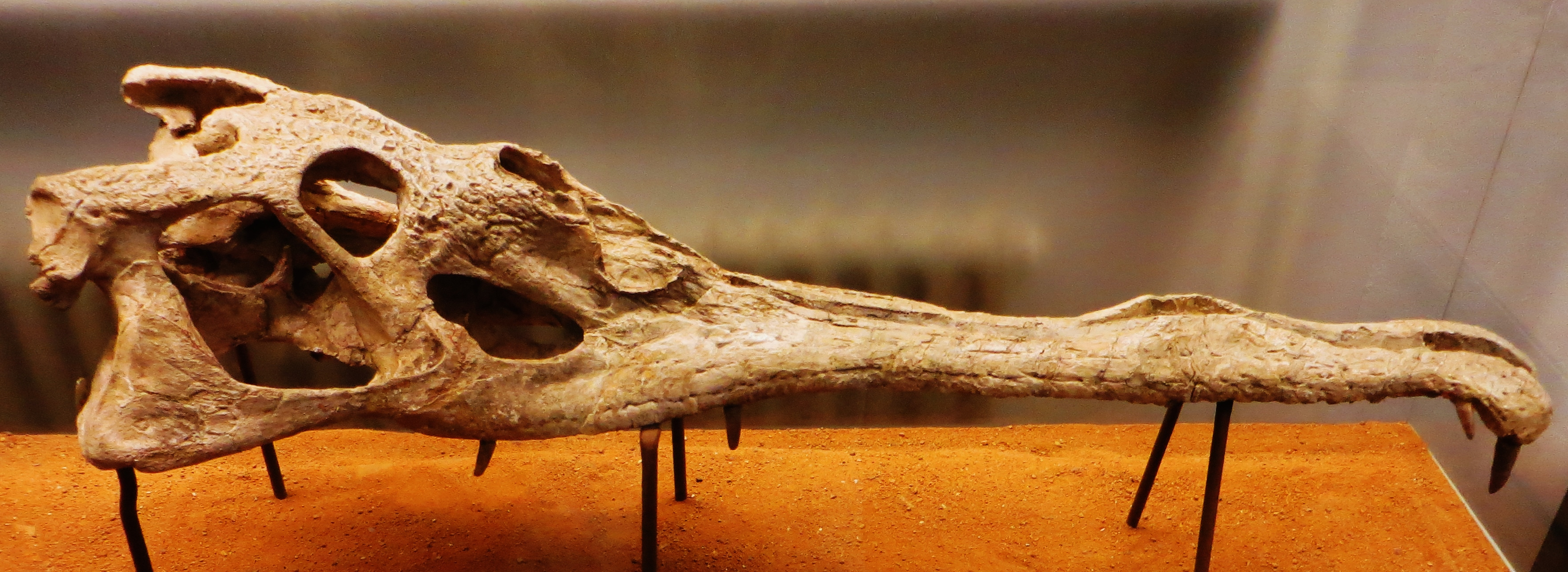 Fossil of Mystriosuchus, an extinct reptile - Took the picture at Museum of Paleontology, Tuebingen